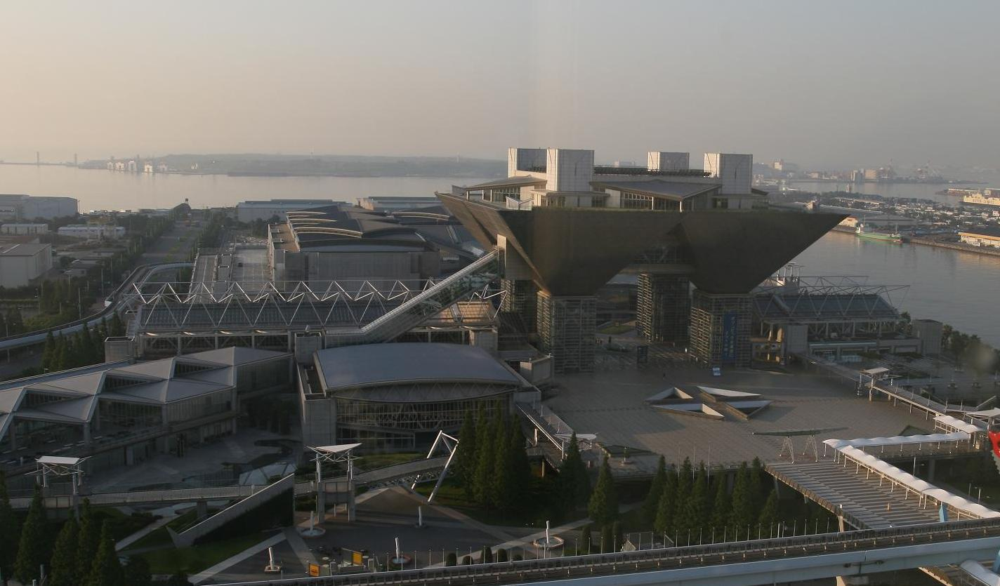 東京ビックサイト 会議棟 と西ホール 上空写真